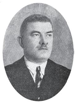 Христо Попопв.